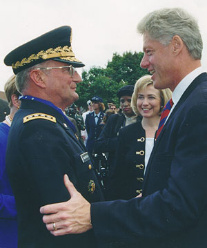 Genreal Shalikashvili and Bill Clinton